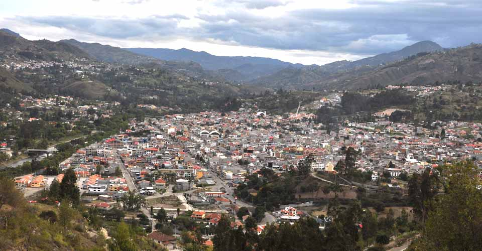 Vista aerea de la cuidad de gualaceo